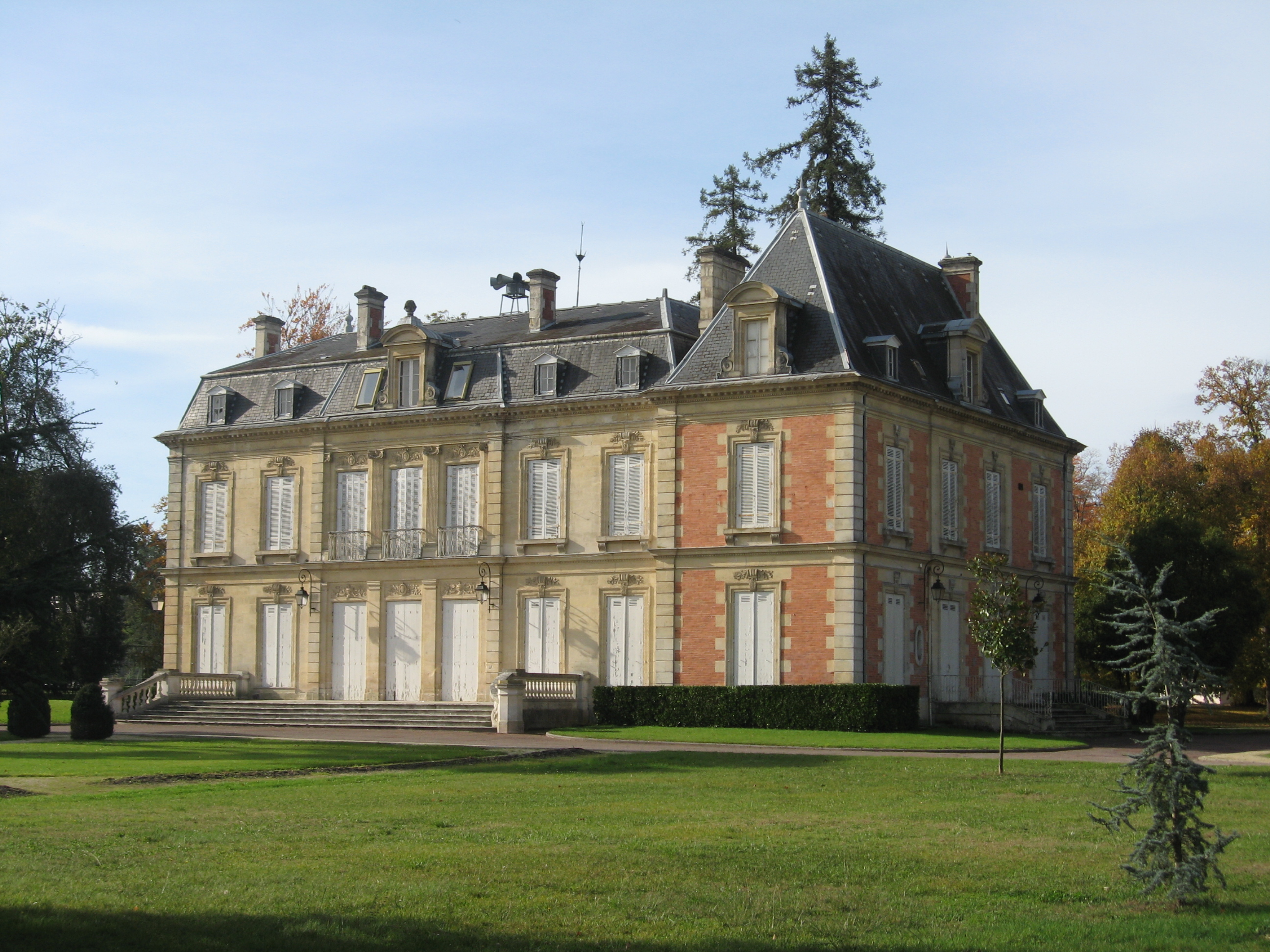 Château de l'Ermitage à Gradignan